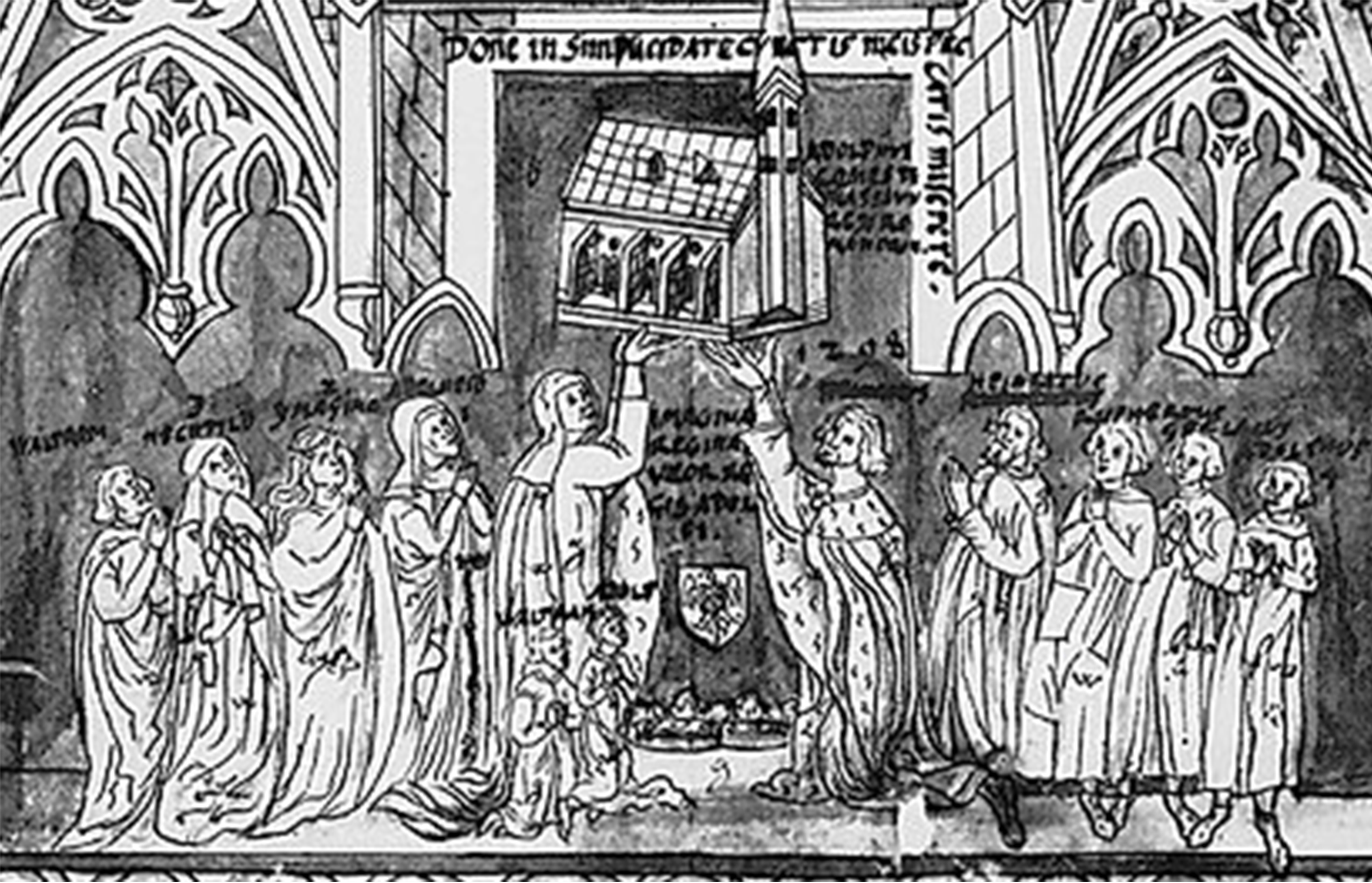 King Adolf von Nassau and his wife Imagina. Mural at Klarenthal Convent (near Wiesbaden), Original destroyed in 17.th century, paper-coppy from 1632.